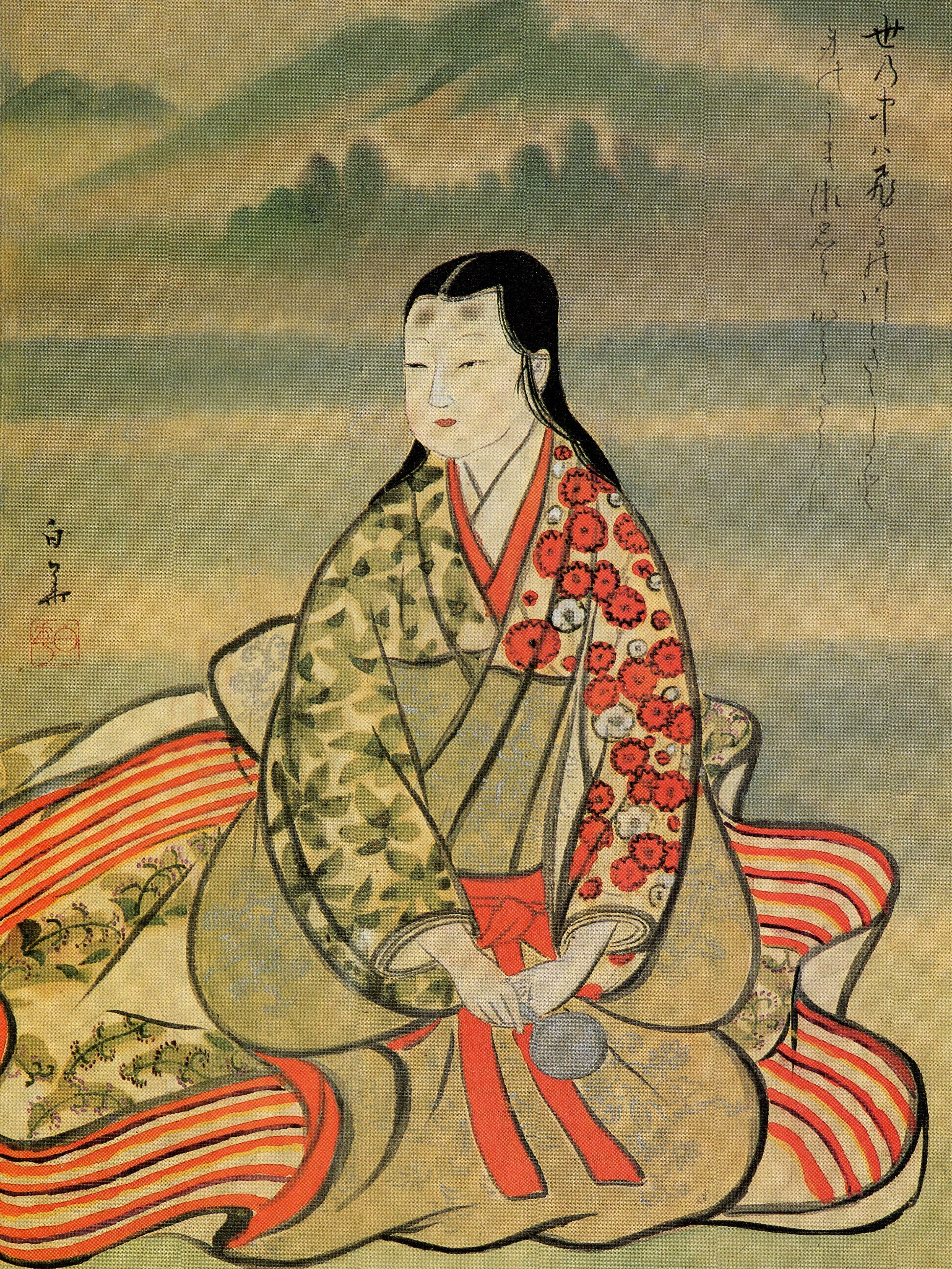 築山殿(関口義広の女、徳川家康の正室)の肖像。